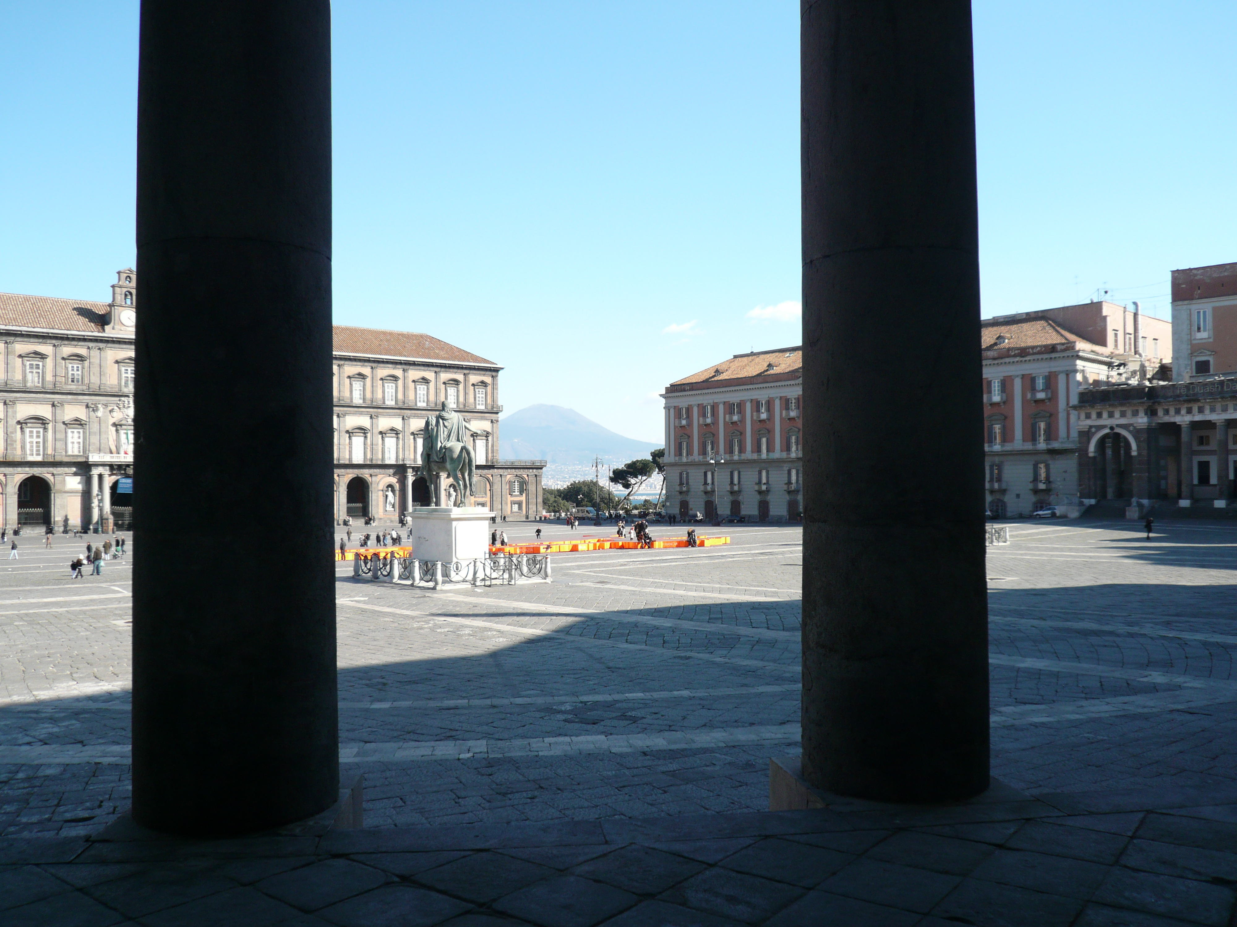 la Piazza vista dal colonnato della Basilica di San Francesco di Paola. Si notano una delle due statue equestri e il Palazzo Reale. Sullo sfondo il Vesuvio Autore foto: Roberto De Martino